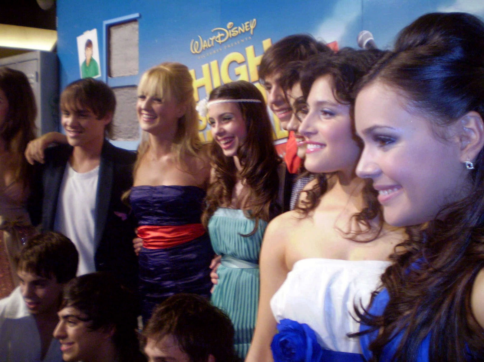 Los chicos de HSM El Desafío en la premiere de la película.